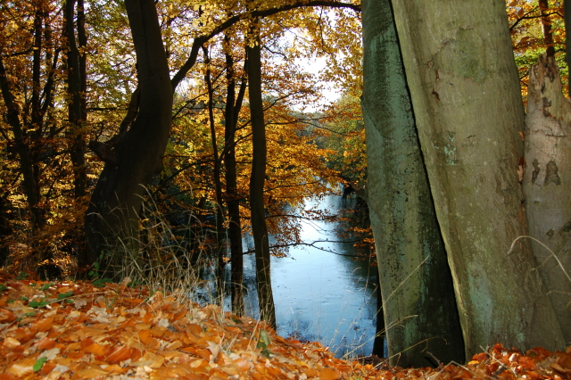 Buczyna nad Słupią